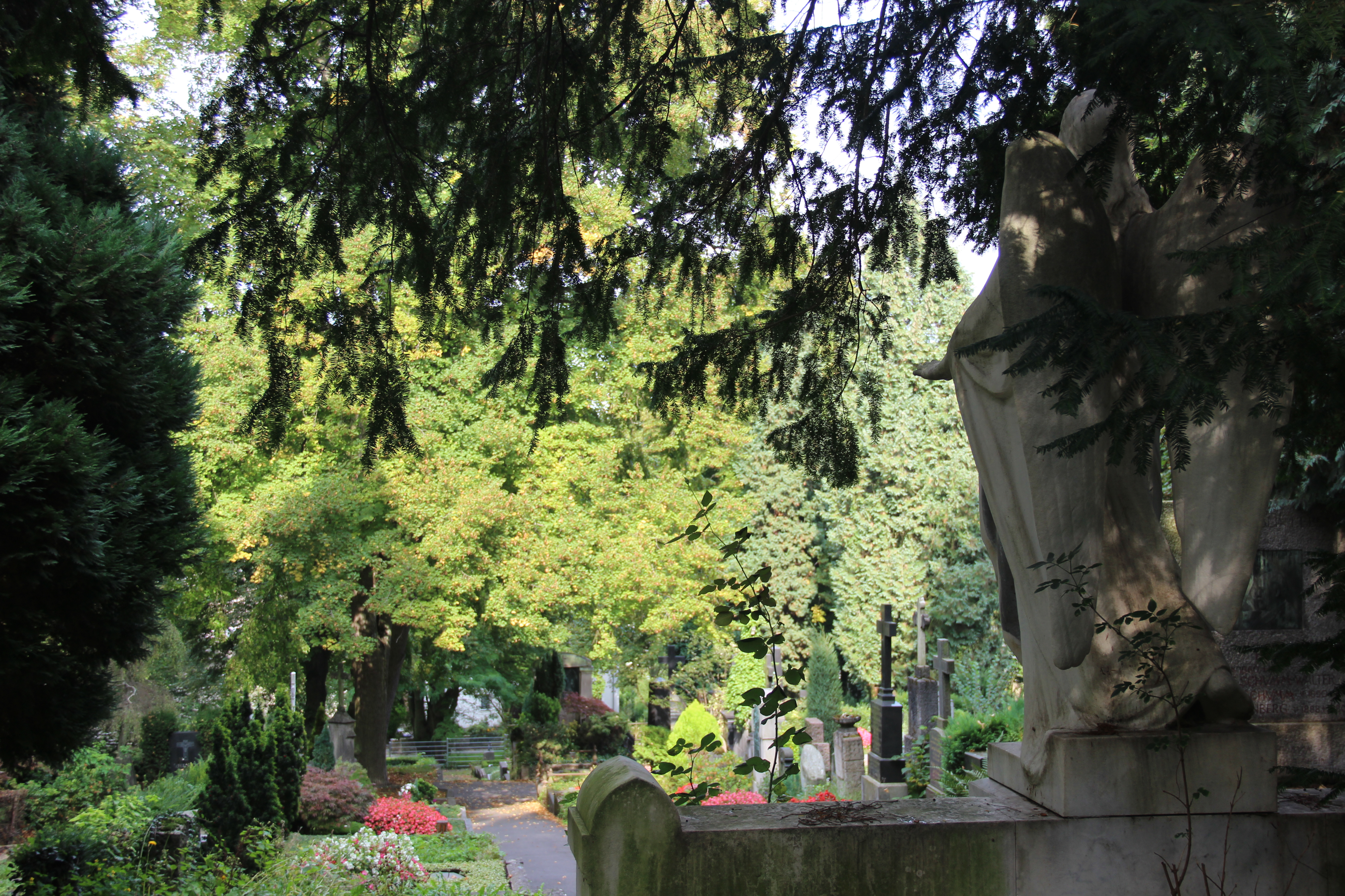 Blick über den Friedhof Kessenich, Gregor-Mendel-Straße/Am Buchenhang, Bonn-Kessenich